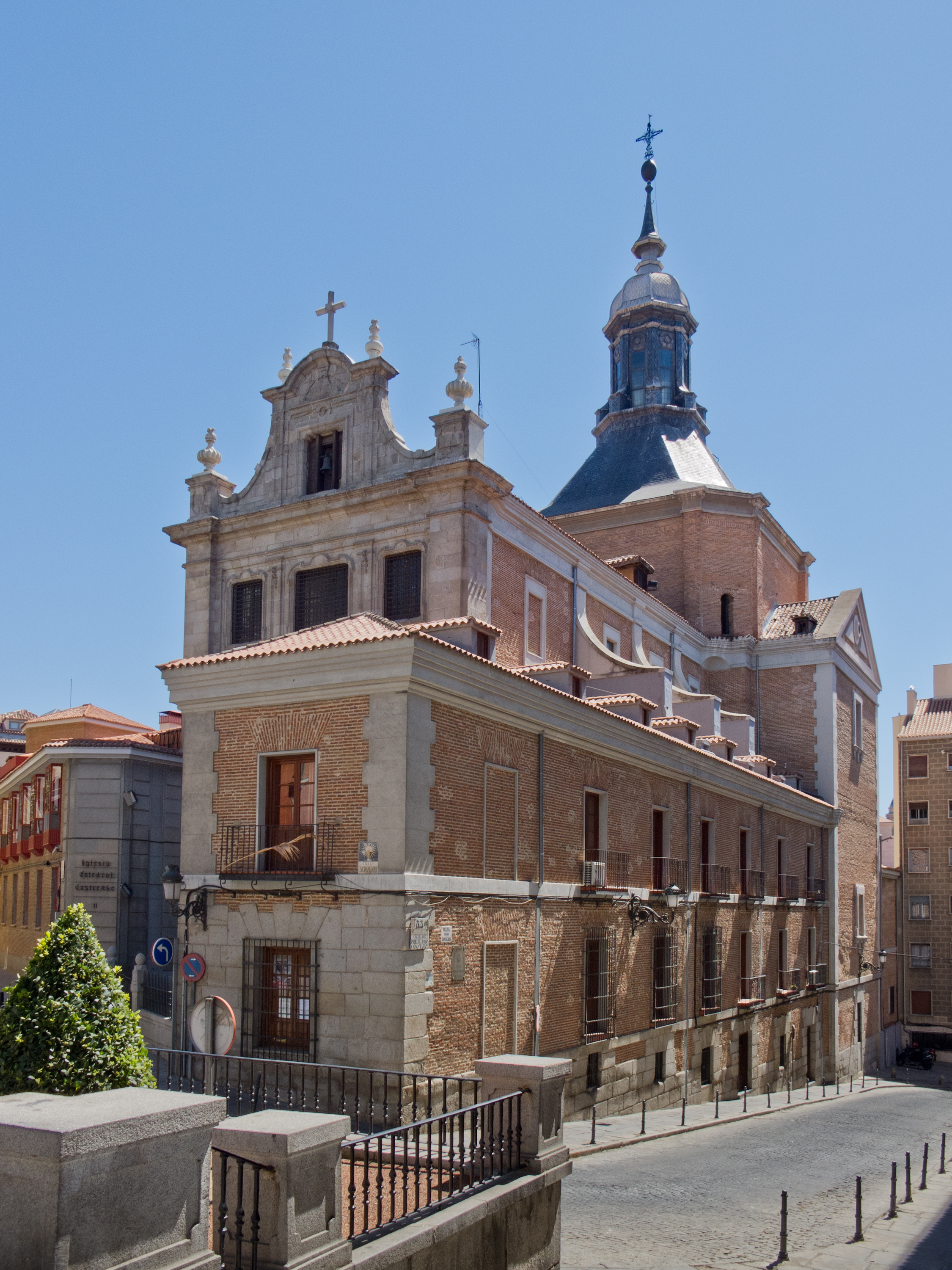 Iglesia del Sacramento, sede del Arzobispado Castrense, Madrid, España.